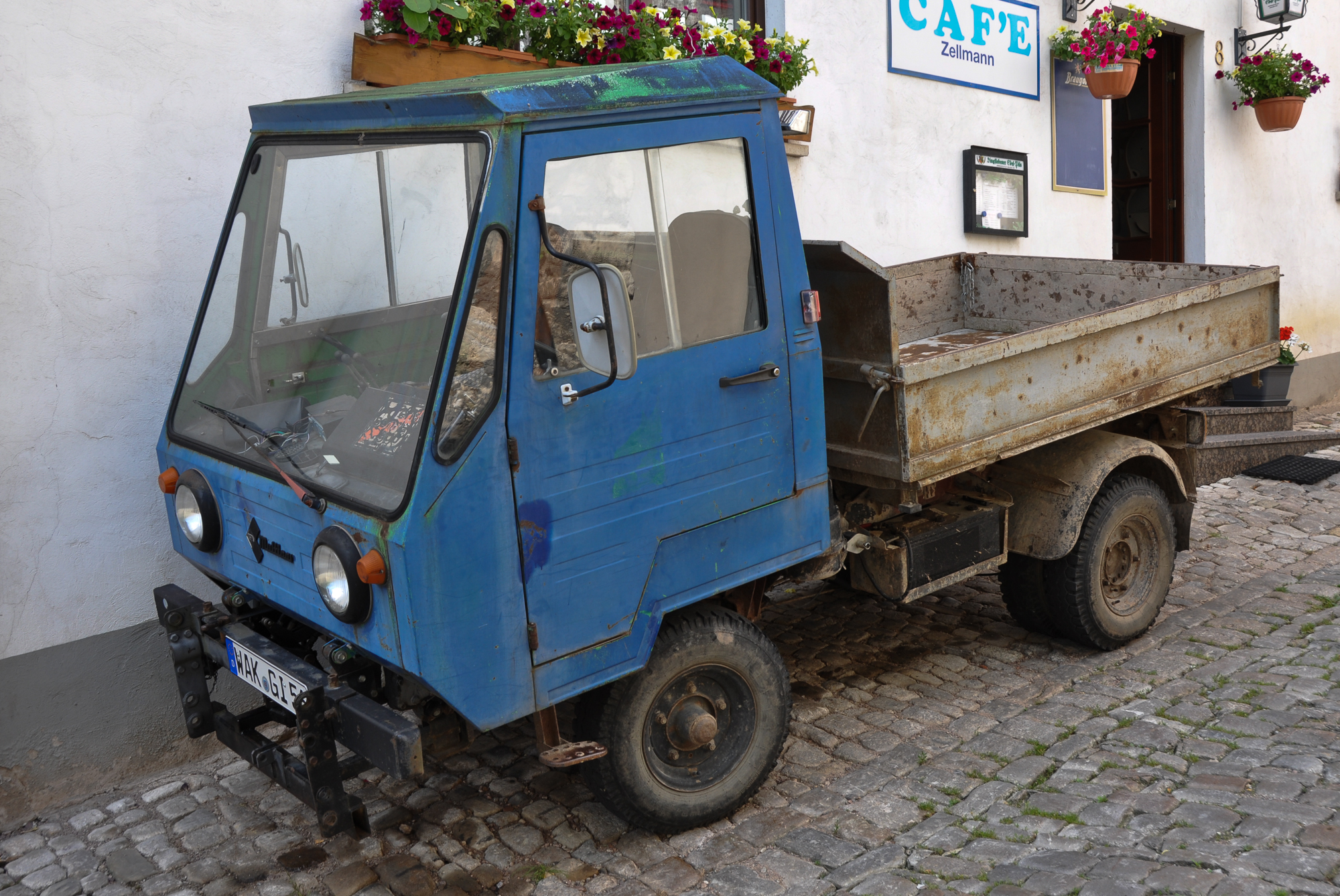 ..gesehen in Treffurt/Thüringen. Immer noch im Dienst...